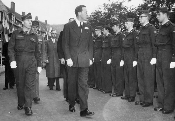 H.K.H Prins Bernhard inspecteert de JLB erewacht bij de opening van het nieuwe KNVvL gebouw in Den Haag op 19 october 1957.